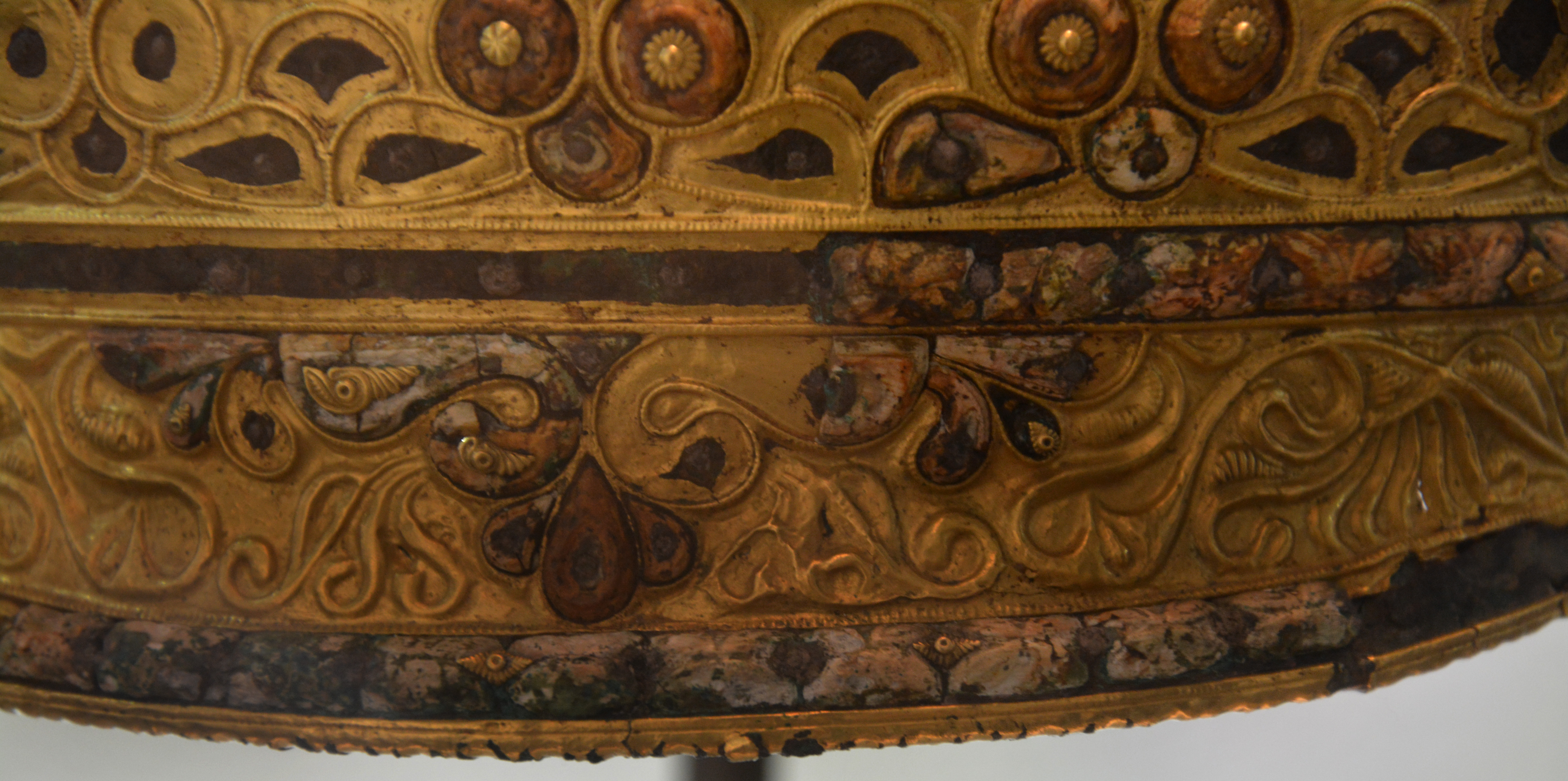 Casque celte et gaulois d'apparat dit casque d'Agris; à coque en fer, recouverte de bronze décoré de feuilles d'or repoussées, rivetées (rivets en argent à tête sertie d'un fleuron d'or), argent et éléments décoratifs de corail sertis dans les alvéoles de certains motifs. il a été découvert à Agris, en Charente dans la grotte des Perrats en 1981 ; probablement fabriqué par des artisans de l'ouest de la gaule. C'est l'une des œuvres majeures de tout l'art gaulois. Il est conservé au musée d'Angoulême. Il est daté du second âge du fer, vers 5ème siècle avant Jésus-Christ. L'or provenait sans doute du Limousin ou du Périgord. Des motifs réalisés avec du fil d'or bouleté ornent la pièce mobile qui protégeaient la joue. Le motif principal du pare-joue représente un serpent cornu à longue tête, le monstre des enfers, attribut du dieu gaulois Cernunos. Ce casque n'a probablement eu qu'un usage cérémoniel ou est simplement une offrande. Il n'a pas été trouvé dans une sépulture mais dans une grotte-sanctuaire, brisé volontairement (plusieurs parties ont été arrachée et le timbre a été enfoncé par un coup violent).